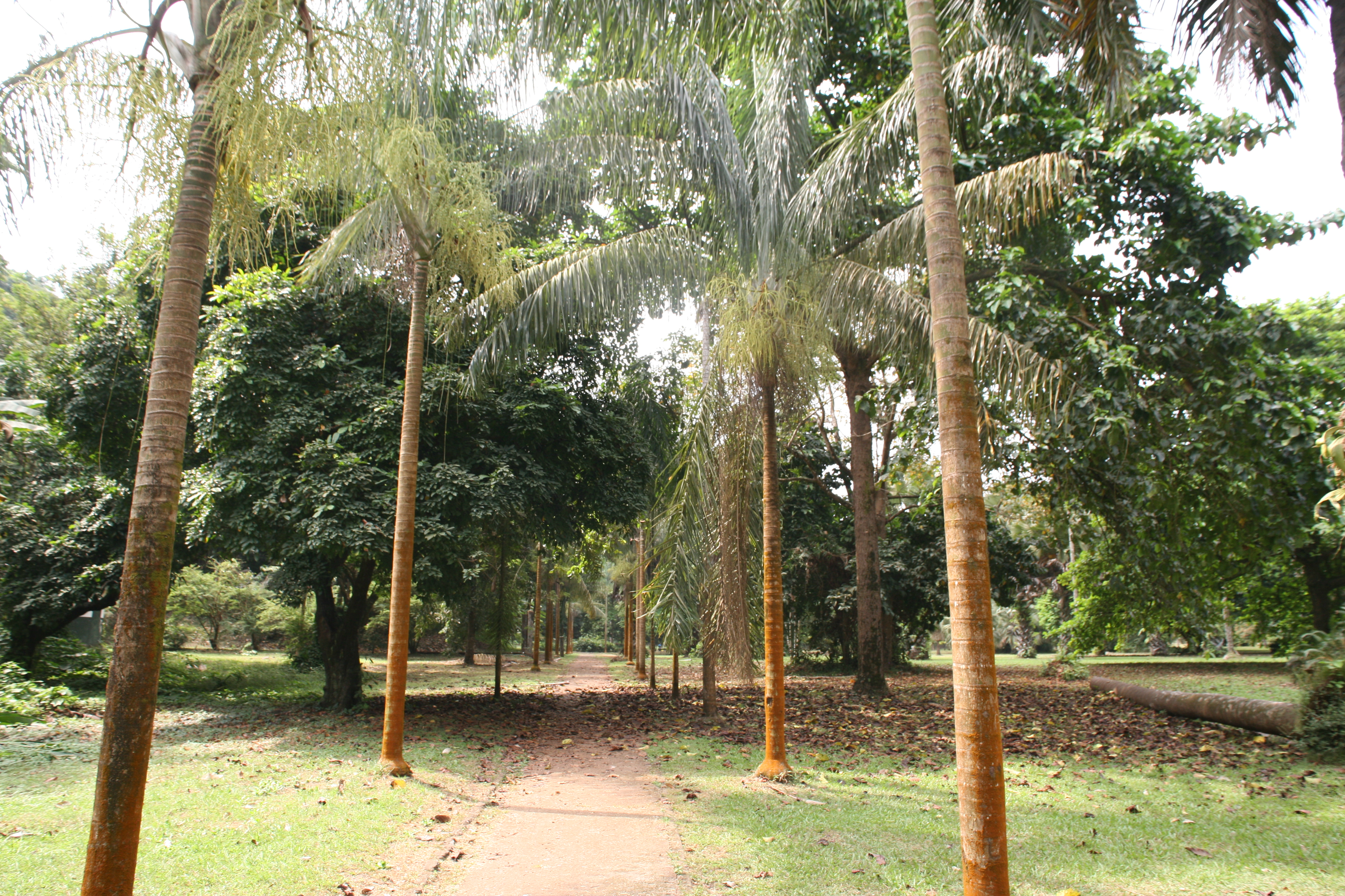 Latania Lontaroides - Jardin Botanique Limbé Cameroun